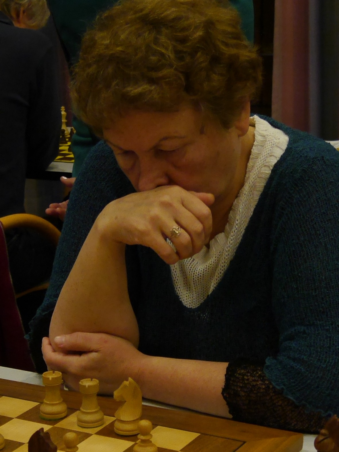 Galina Strutinskaia , Schachweltmeisterschaft der Seniorinnen 2016 in Marienbad.